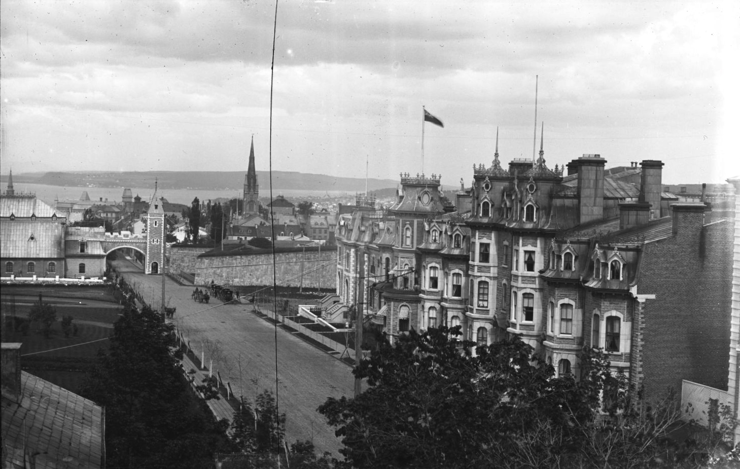 Une partie de la Grande Allée, à Québec, près de la porte Saint-Louis. À gauche, une partie de l'édifice du Québec skating club, qui était situé à cet endroit de 1877 à 1889.